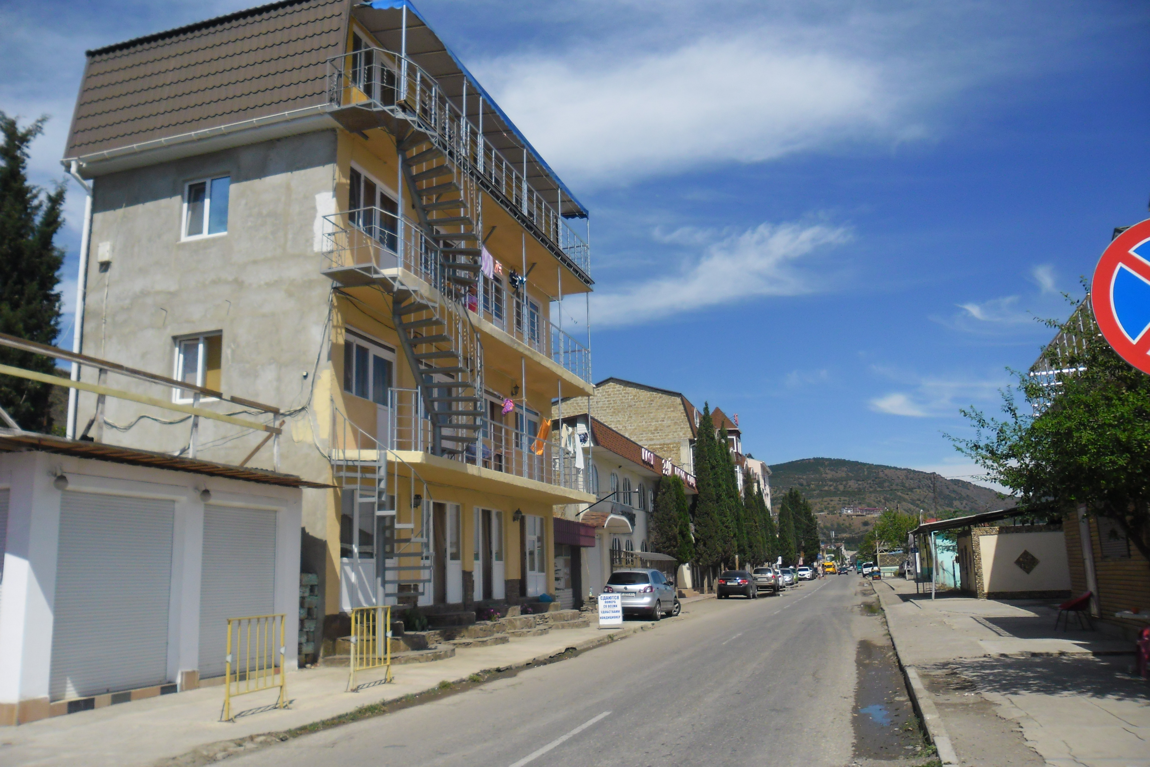 Фото